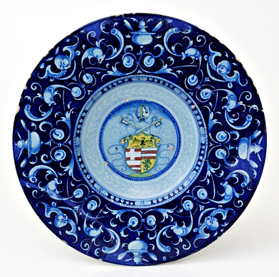 Piatto con ornato a grottesche e stemma di Rodolfo Pio da Carpi, vescovo di Faenza dal 1528 al 1544. Faenza secondo quarto del XVI secolo